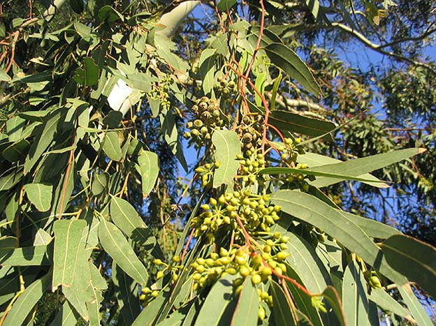 Feuilles et inflorescences d'eucalyptus Photo Jean Tosti (23/04/04, Deltebre, Espagne) Licence GFDL Jean Tosti 04/2004